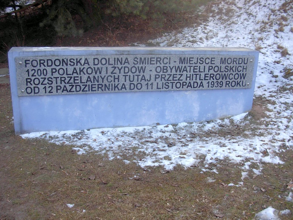 Tablica informacyjna w Dolinie Śmierci w Bydgoszczy